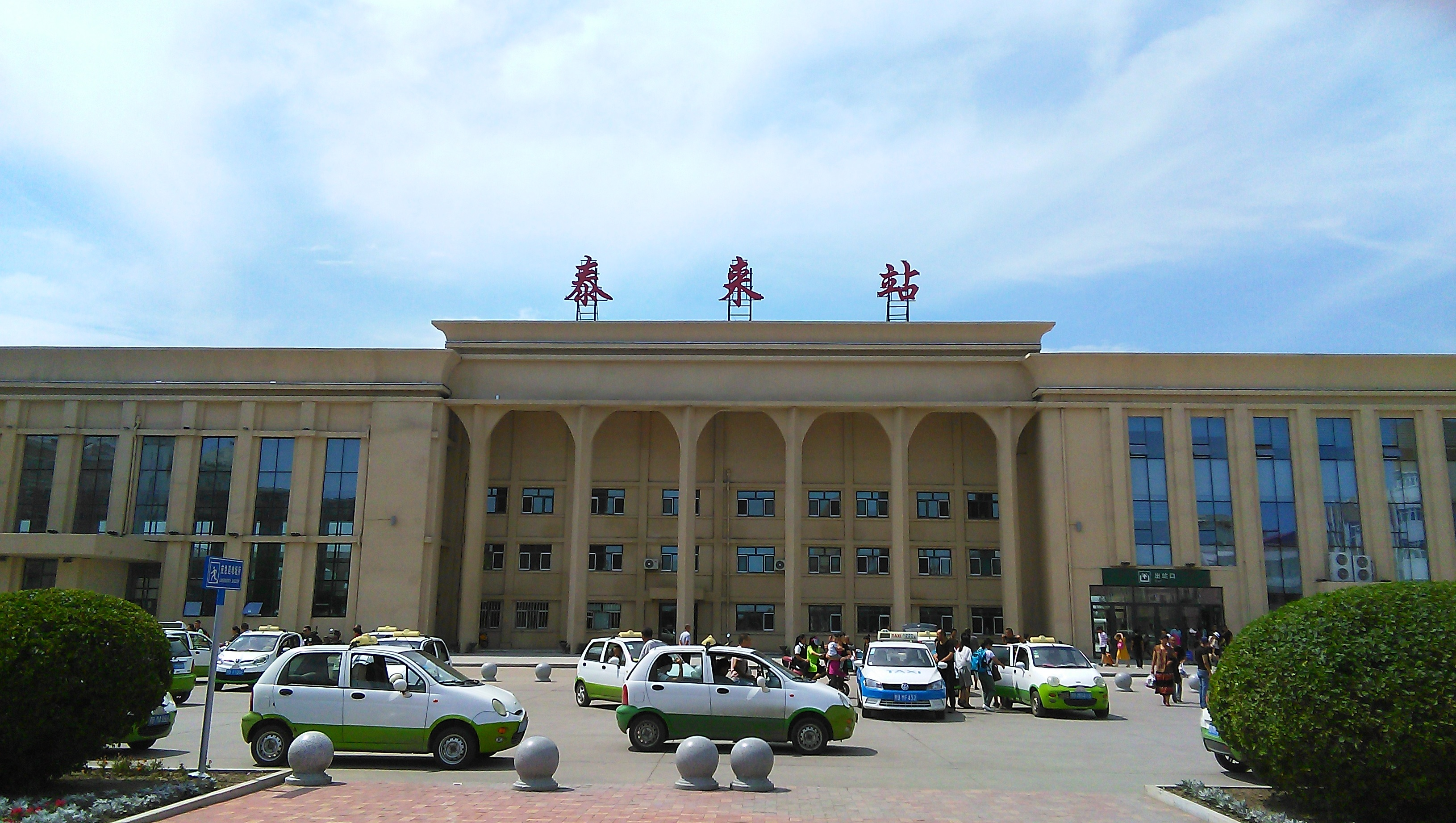 中文（中国大陆）: 泰来站2017夏